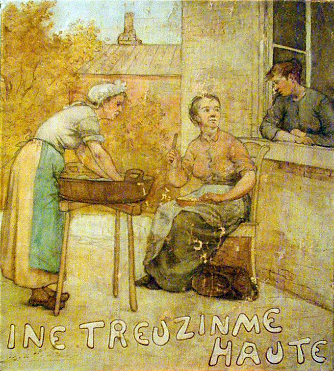 Projet d'affiche pour le théâtre wallon attribué à Armand Rassenfosse (1862-1934)Walon: Pordjet d' afitche k' åreut stî fwaite pa Armand Rassenfosse (1862-1934) po ene pîce di teyåte e walon ki l' tite åreut stî "ene troejhinme hôte